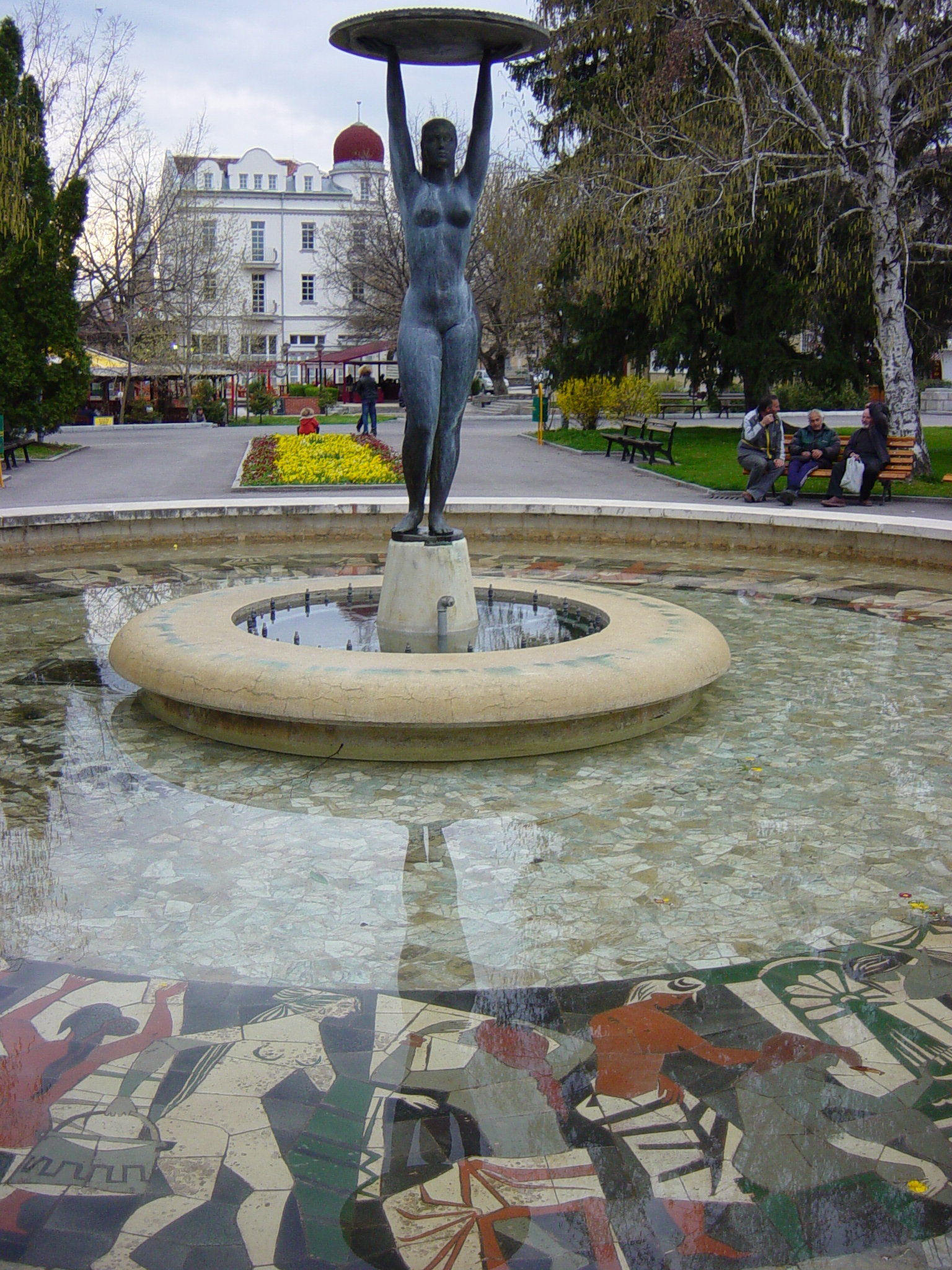 BULGARIA - HISAR